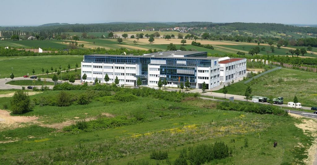 Firma PI in Palmbach, Gewerbegebiet "An der Ochsenstraße"